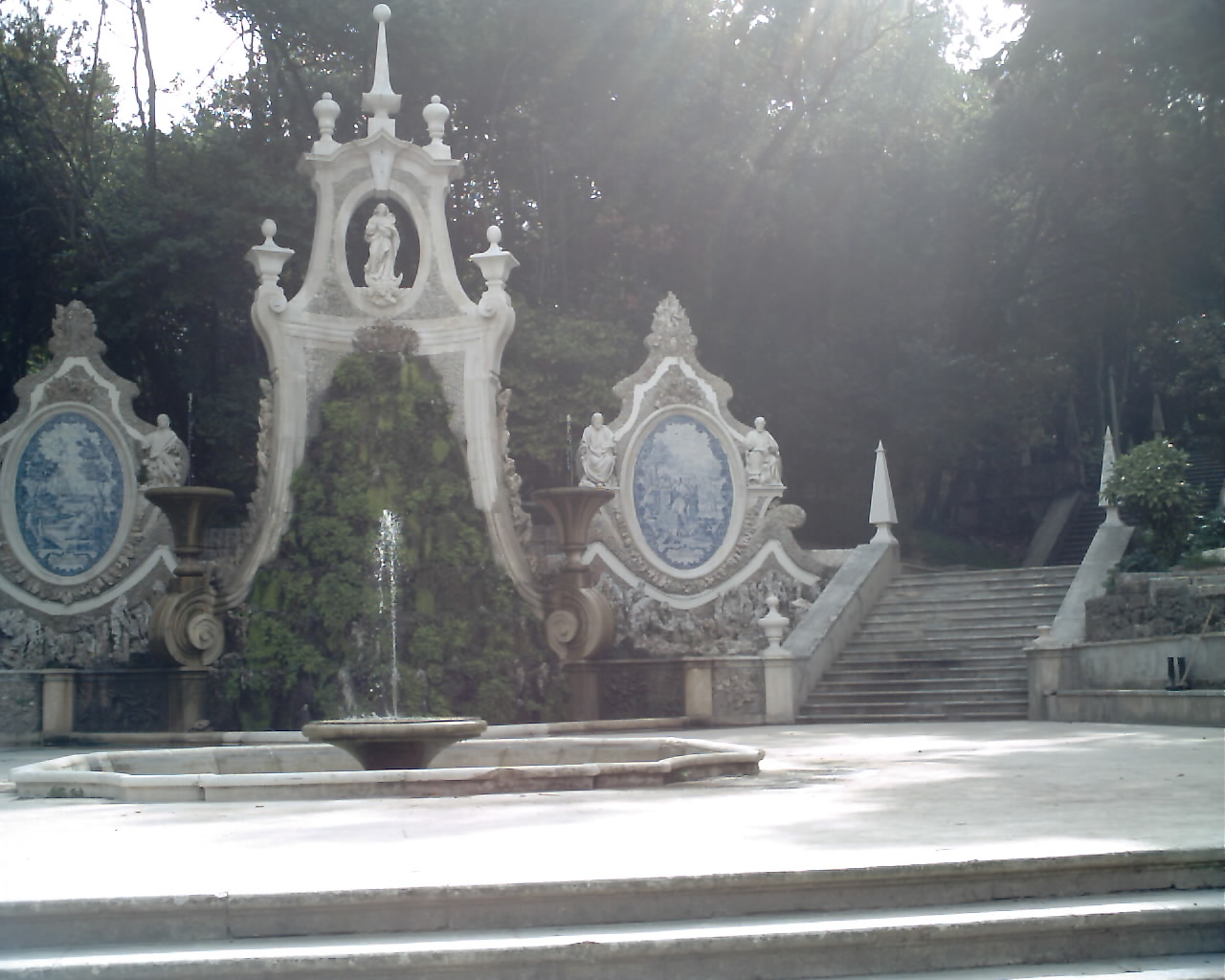 Coimbra Praça da Republica'daki parkta çektiğim bir resim.